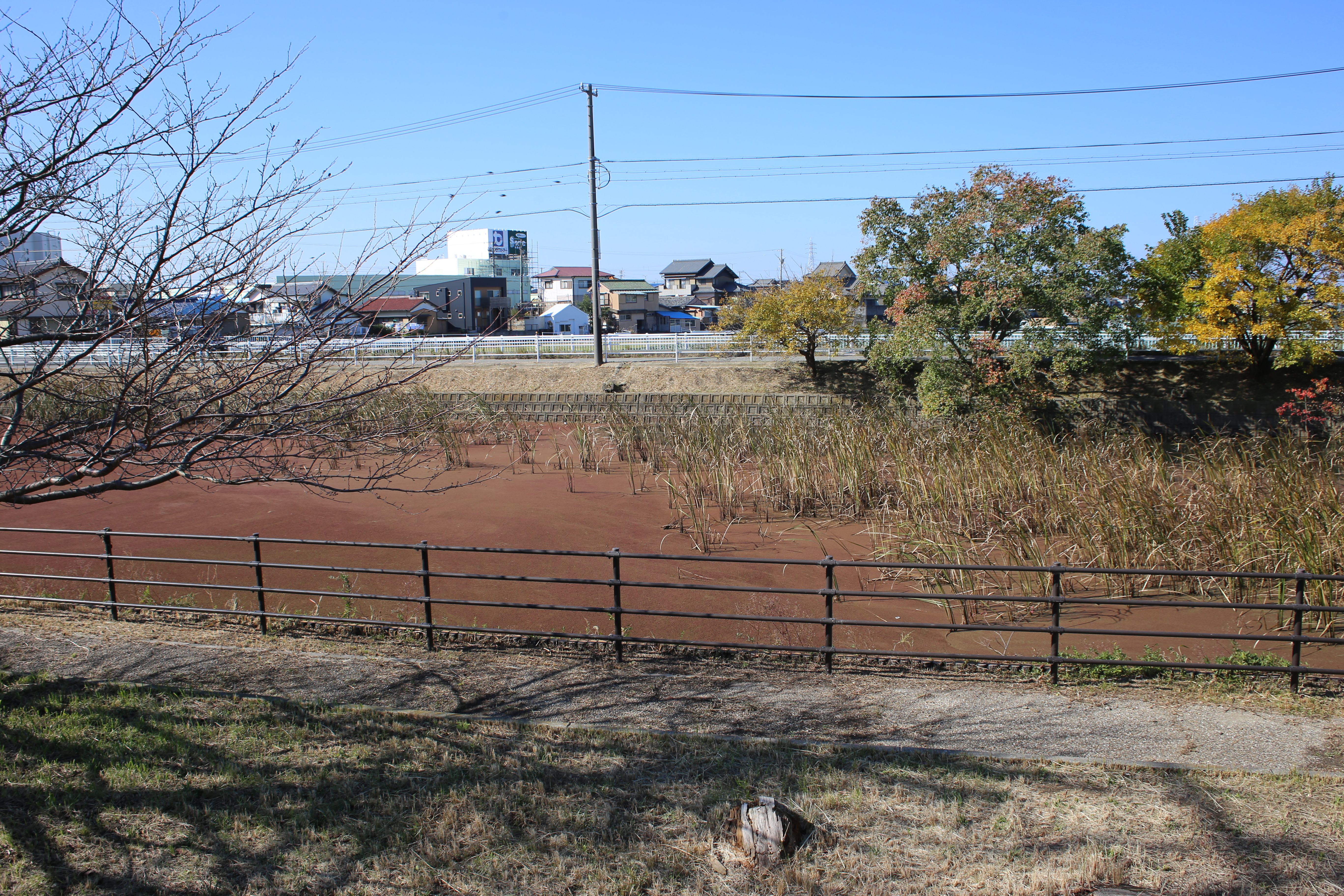 愛知県豊橋市大清水町の彦坂池